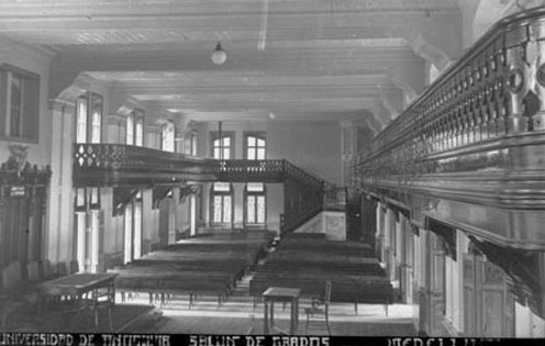 Interior del Paraninfo del Edificio San Ignacio de la Universidad de Antioquia tomada el 01-01-1920, Medellín, Colombia.